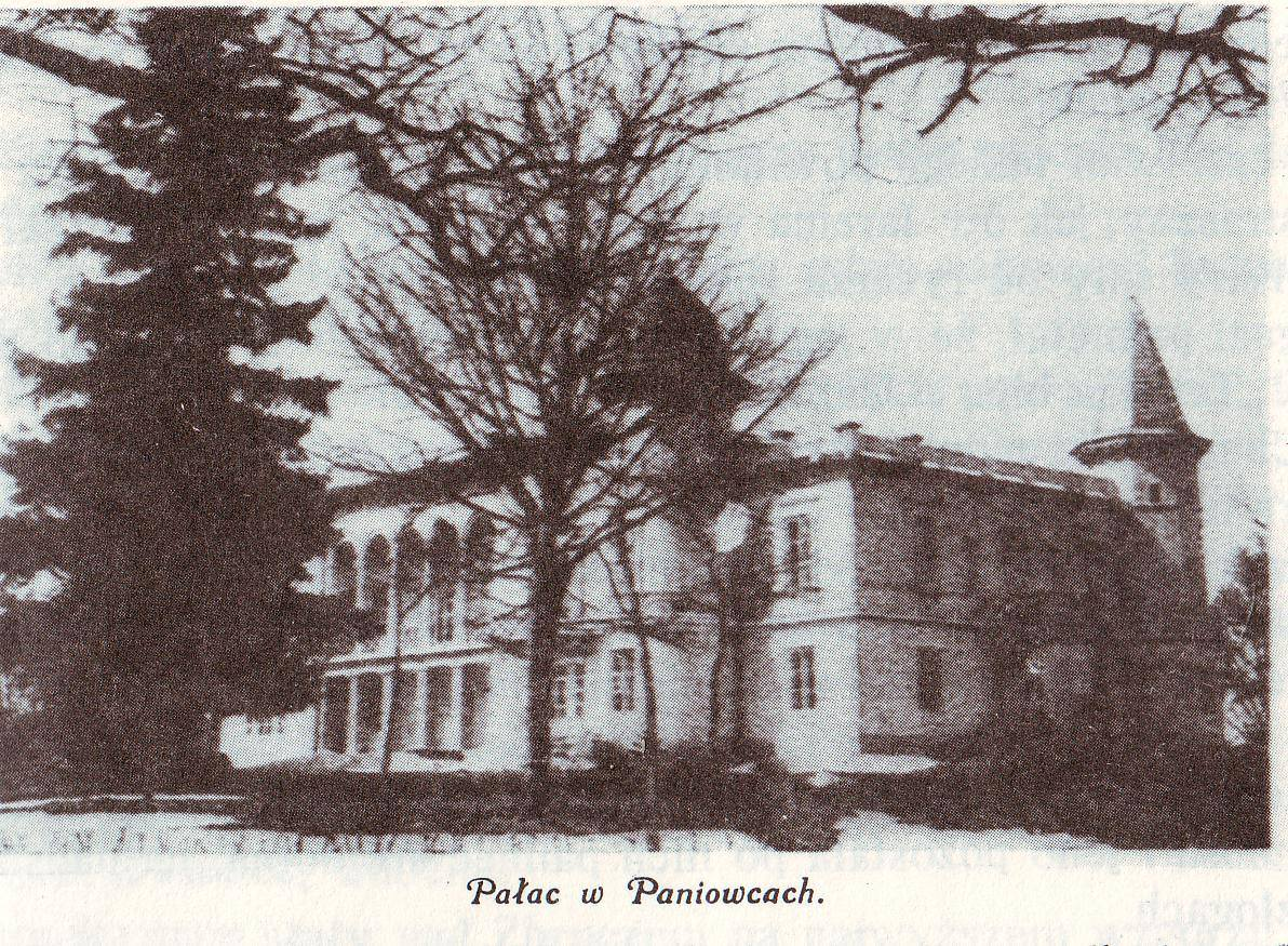 Paniowce - pałac